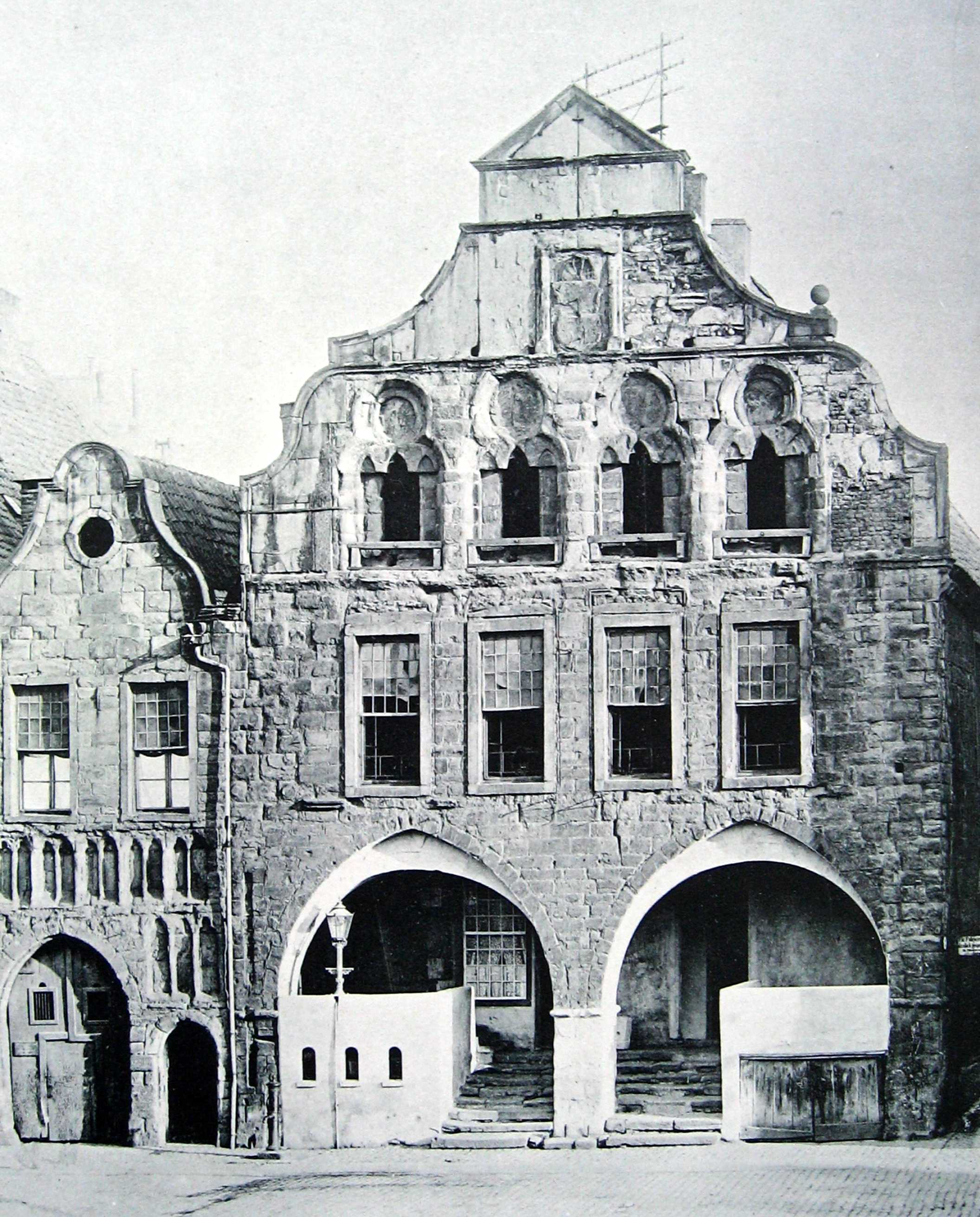 Dortmund, Altes Rathaus und Stadtwaage